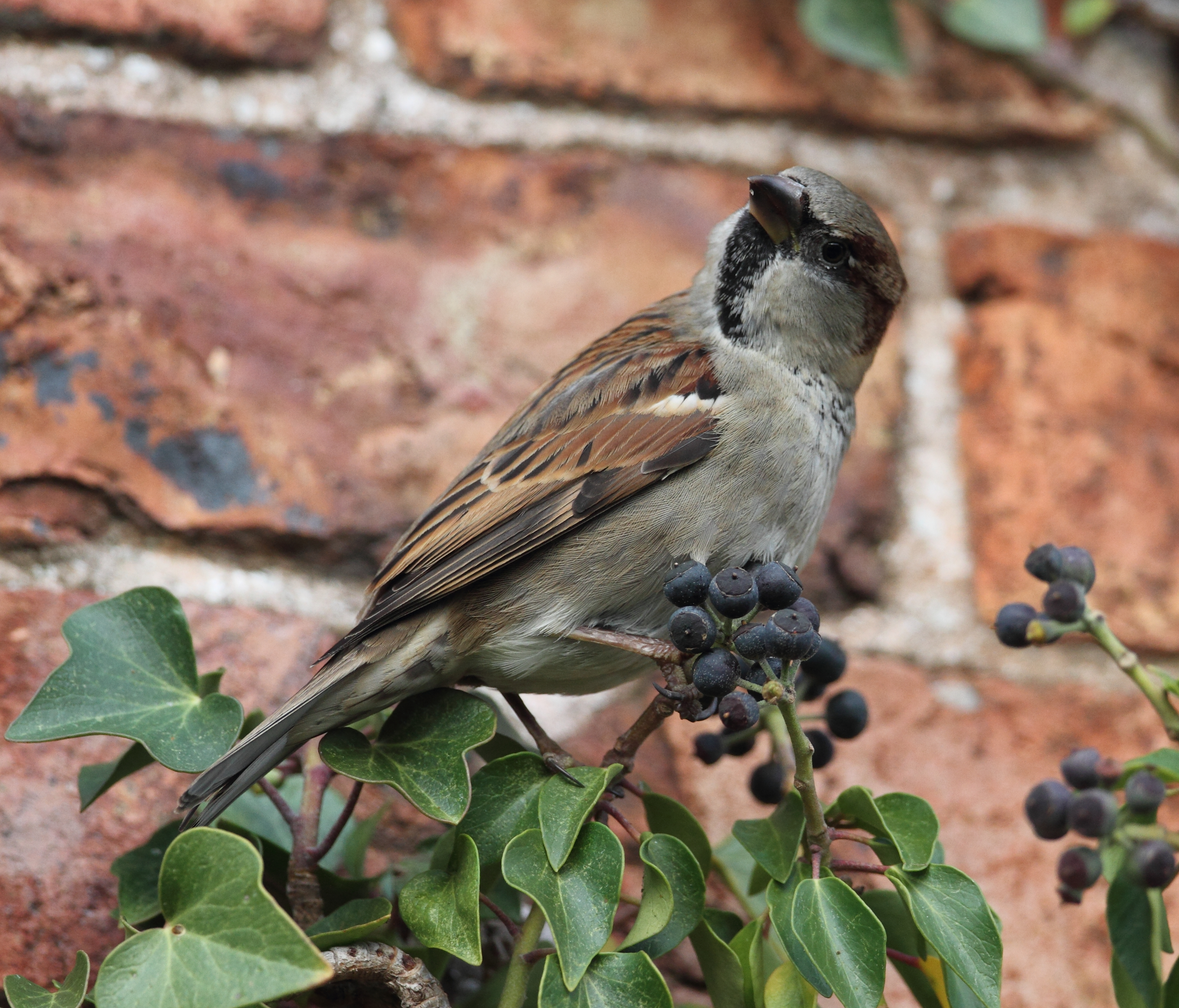 Aderyn digon cyffredin ond sydd wedi lleihau mewn niferoedd yn sylweddol.